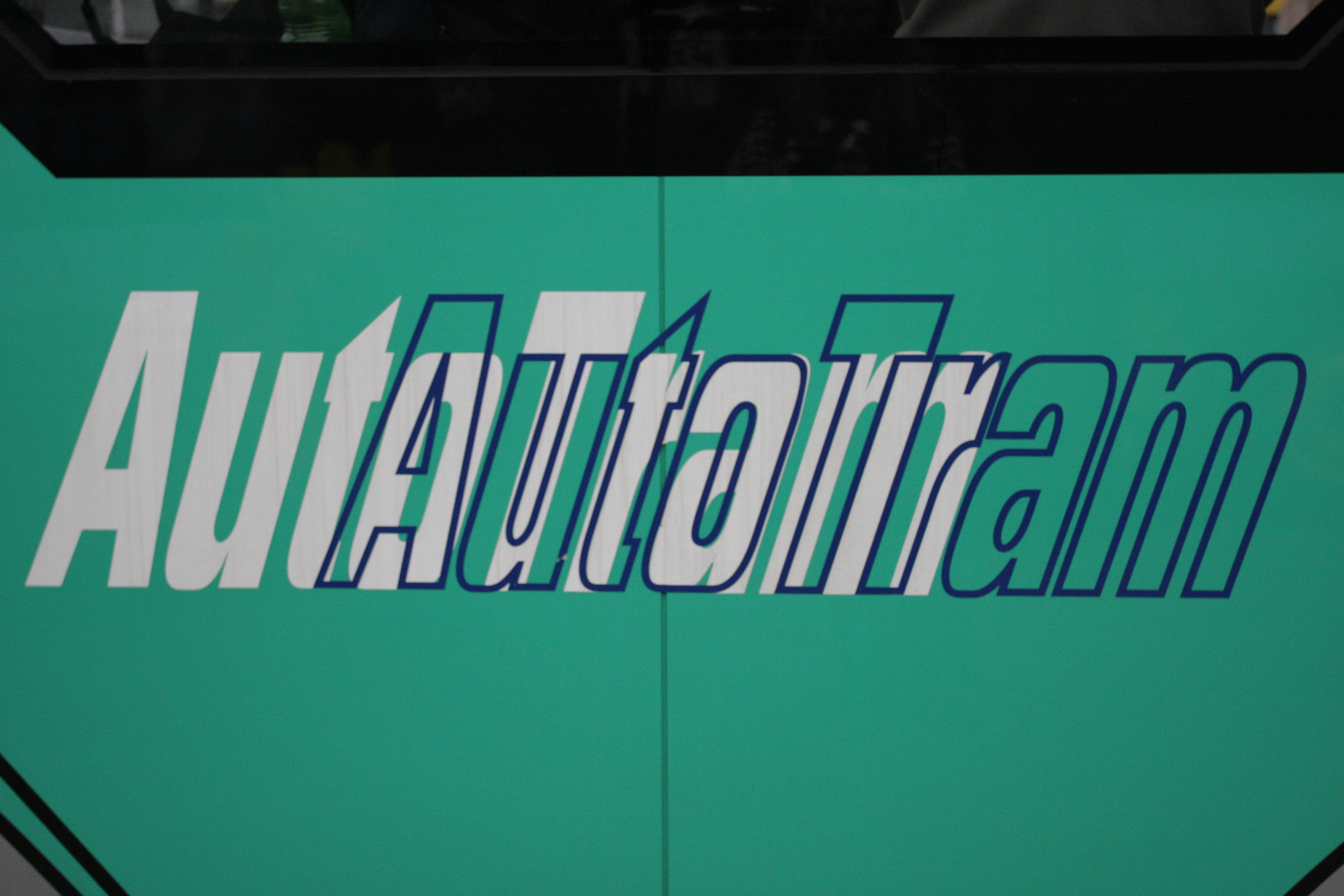 AutoTram Busbahn mit optischem Leitsystem im Busbetriebshof Dresden Gruna (95 Jahre Busbetrieb in Dresden)